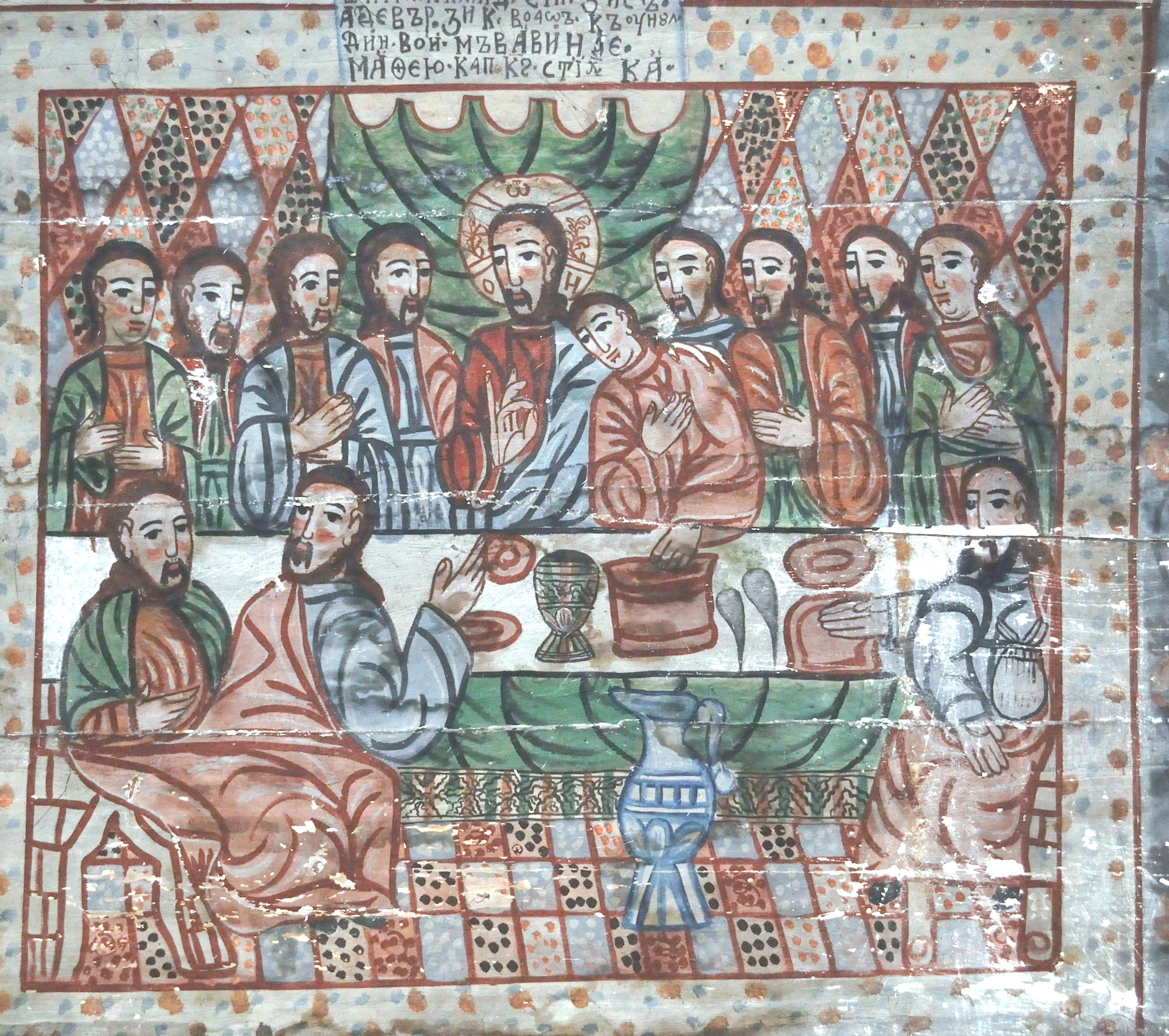 Biserica de lemn din Agârbiciu, județul Cluj